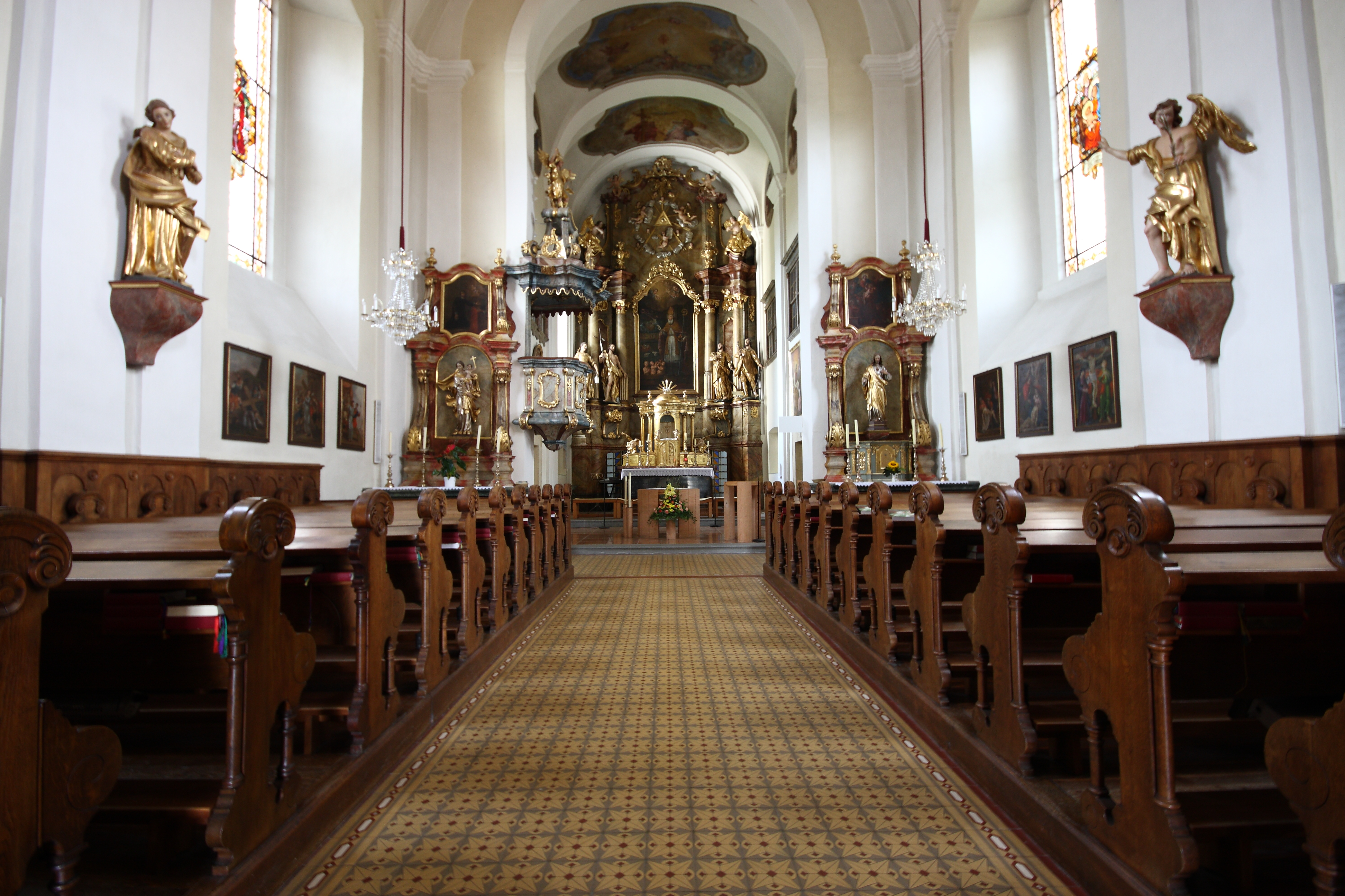 Kath. Pfarrkirche, hl. Nikolaus